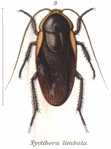 Nyctibora limbata (=Nyctibora sericea)